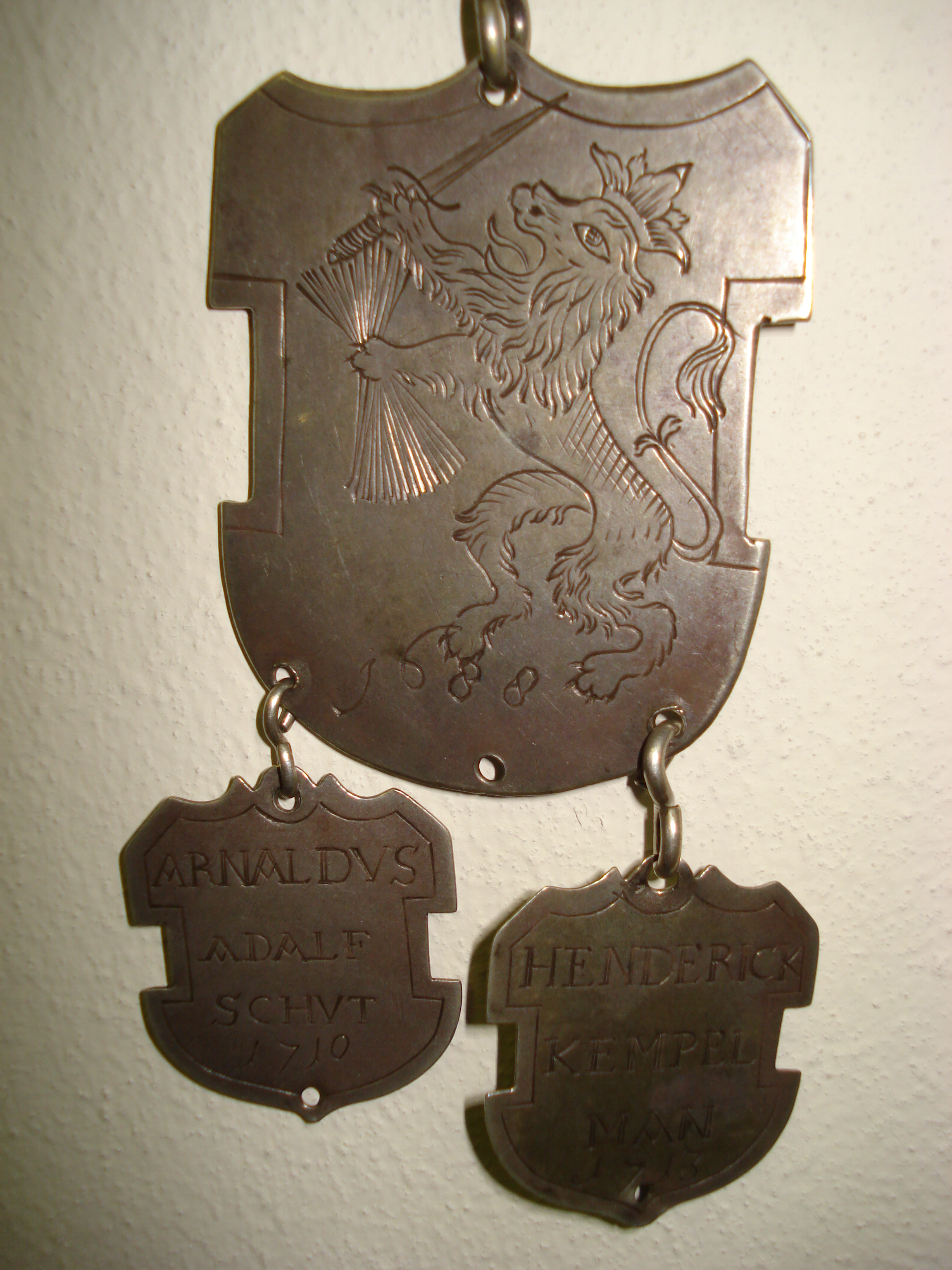 Gildezilver 1688 met de leeuw der zeven provincien